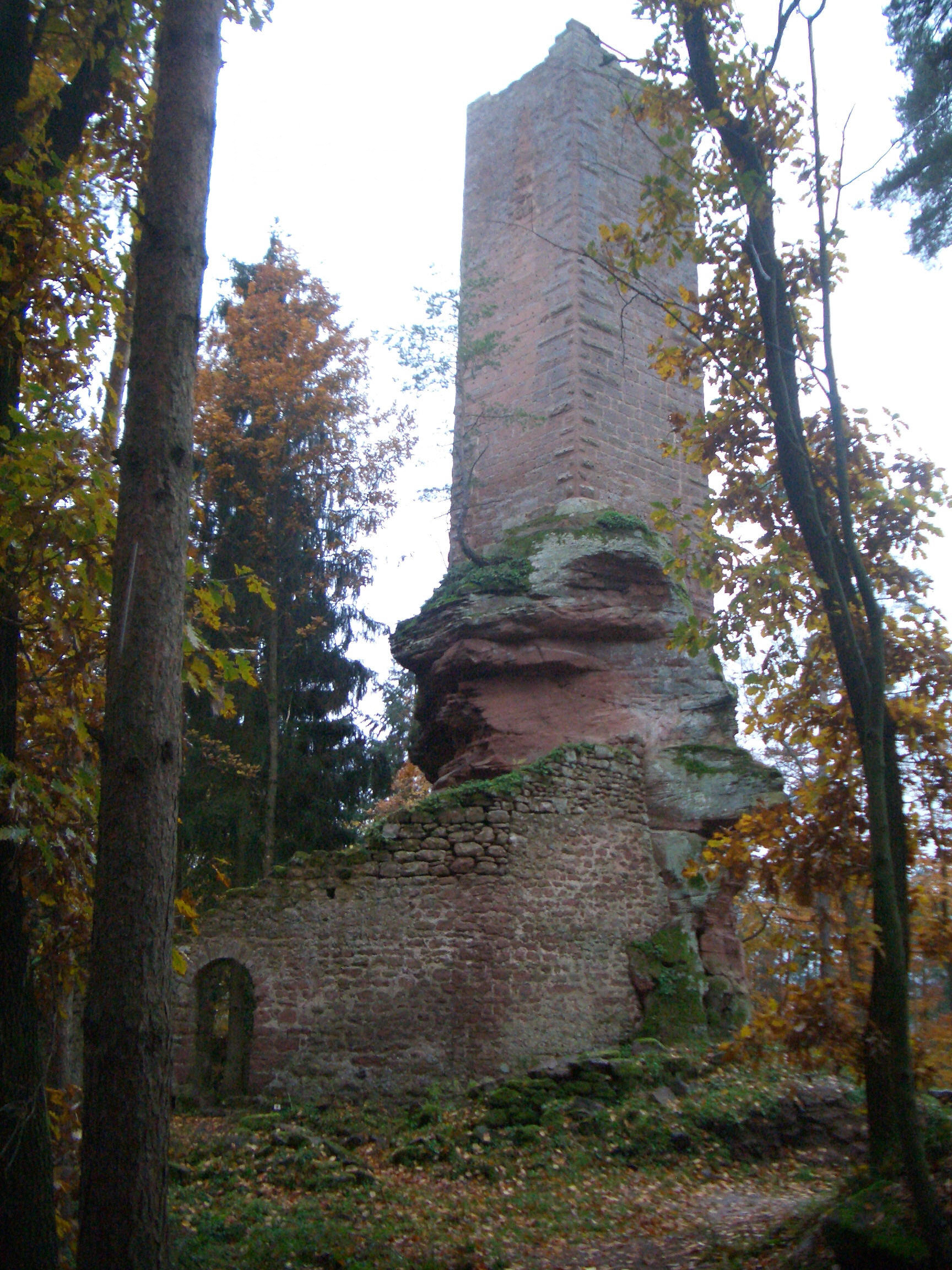 Die Burgruine Wineck bei Windstein / Obersteinbach im Elsaß